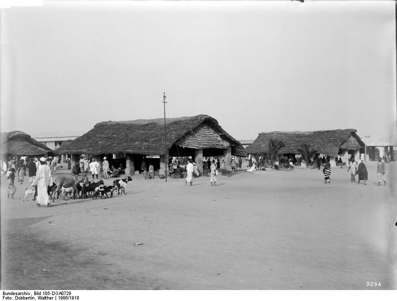 Tabora, Marktplatz